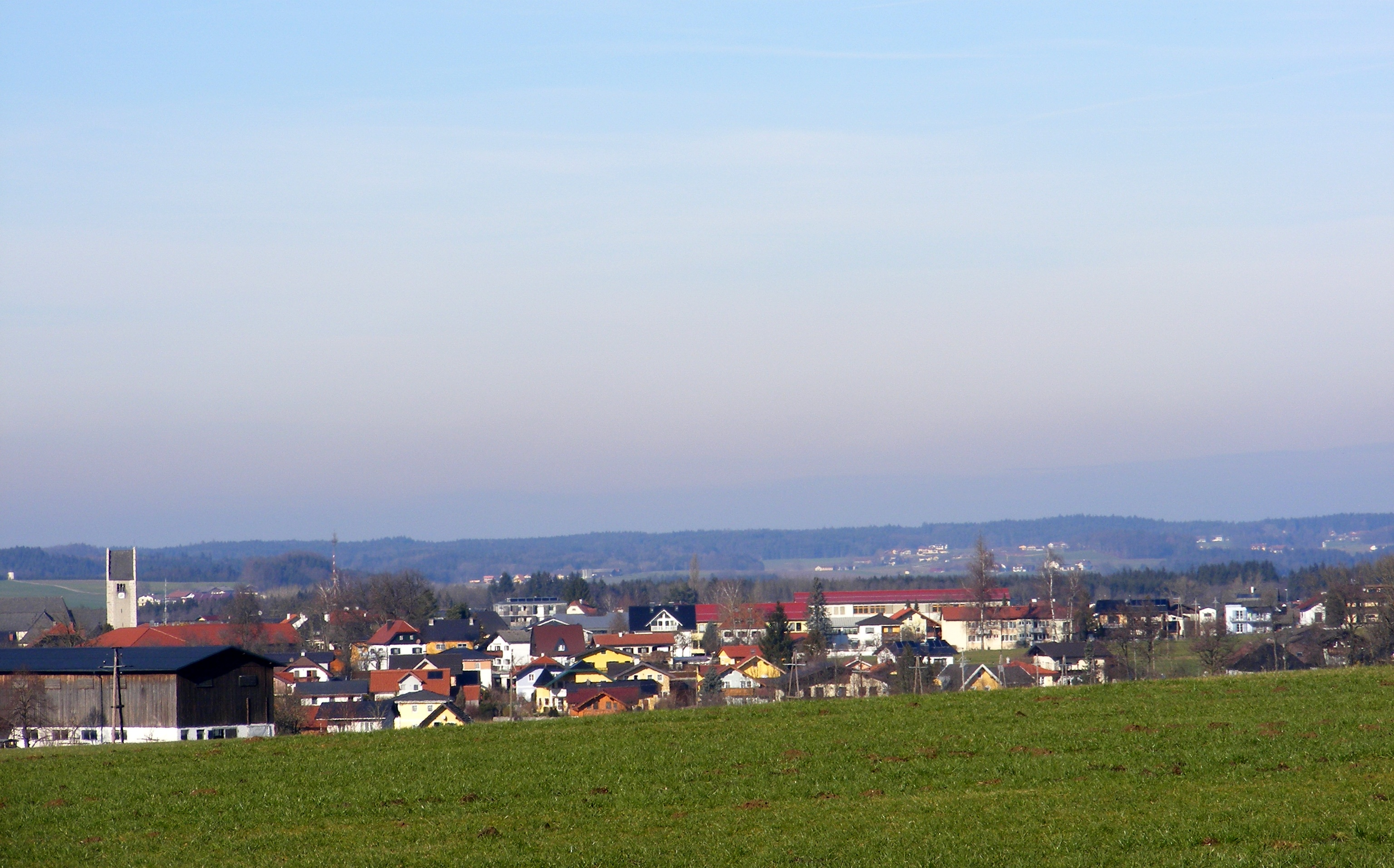 Lamprechtshausen, Bezirk Salzburg-Umgebung, Land Salzburg.